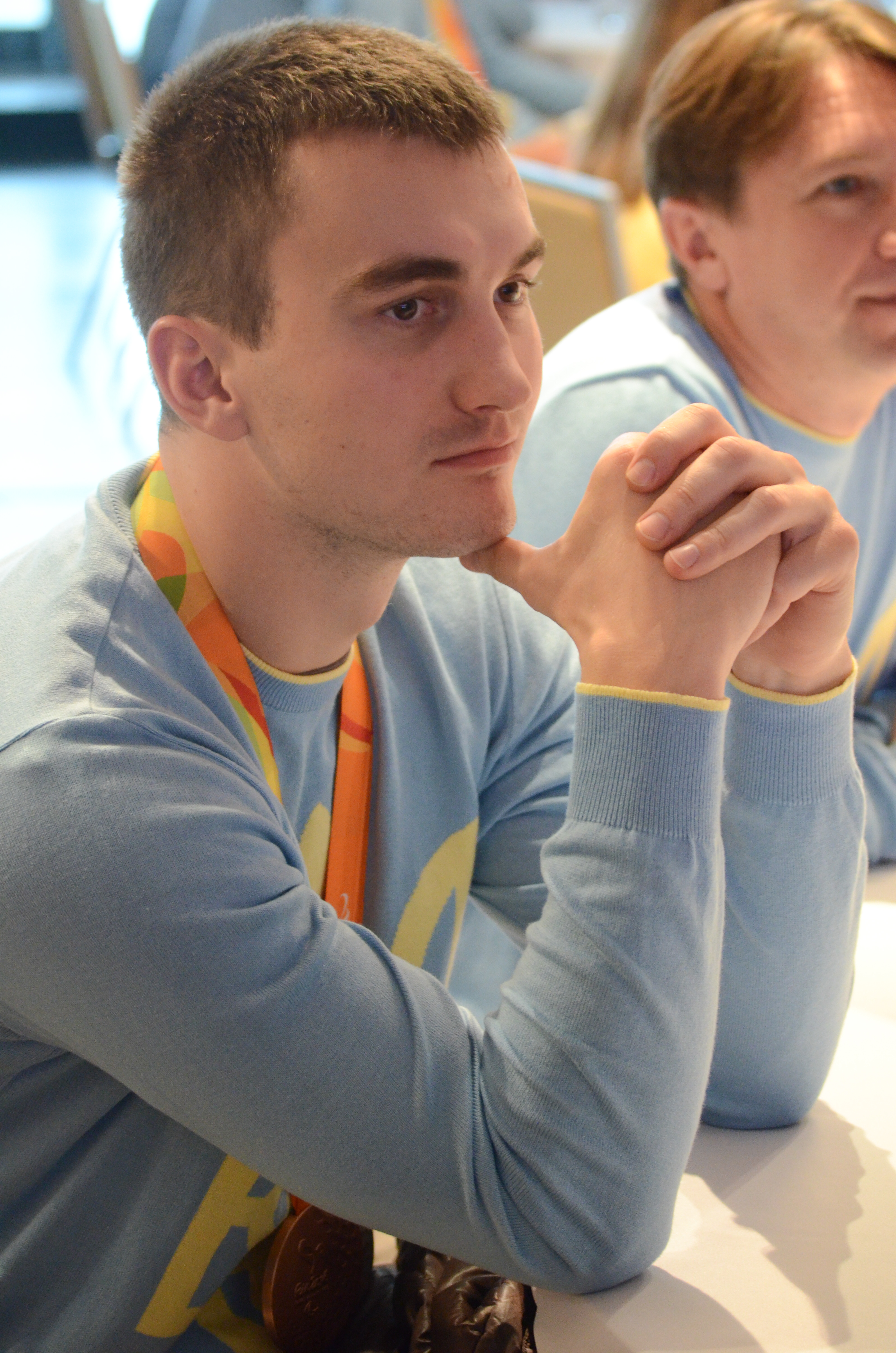 Зустріч Президента України з олімпійцями та паралімпійцями — учасниками Ріо-2016.